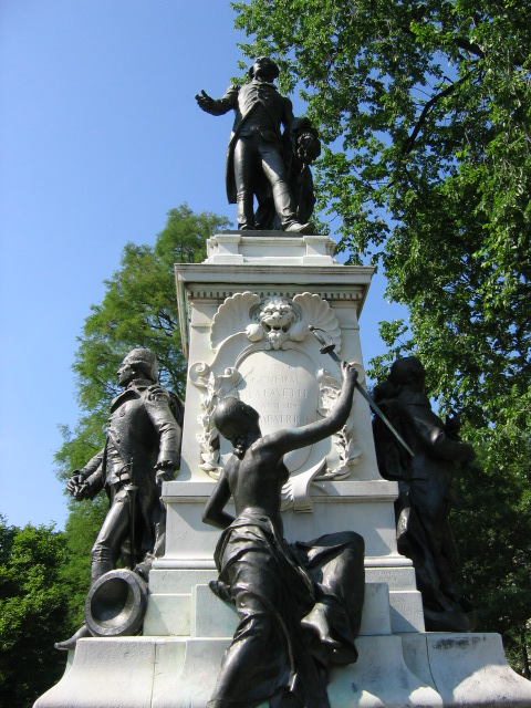 La Fayette Denkmal in Washington D.C., Mai 2004 (selbst fotografiert)